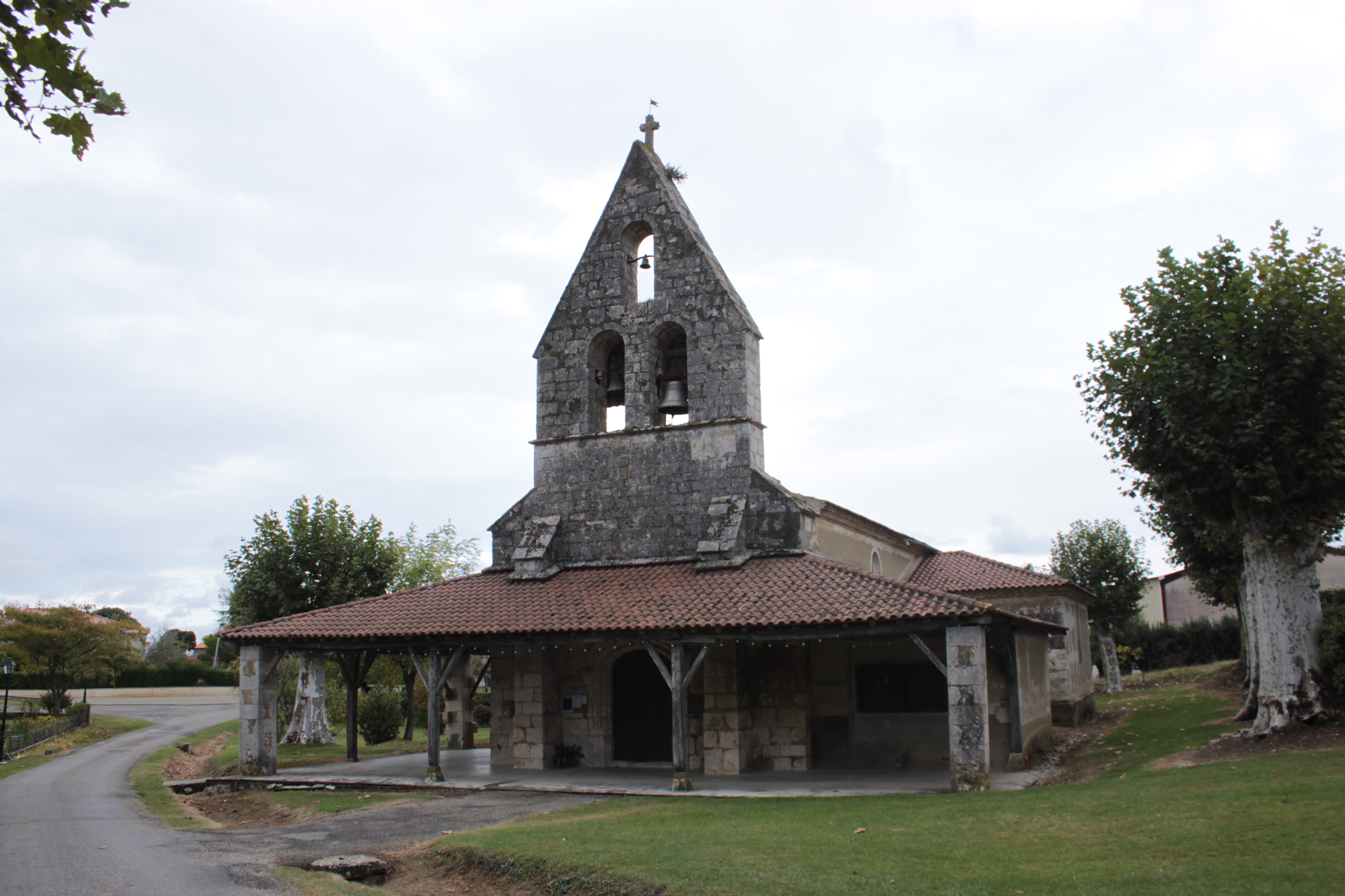 Église Saint-Orens, Fr-32-Bajonnette.